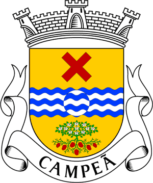 Brasão da freguesia da Campeã (concelho de Vila Real)